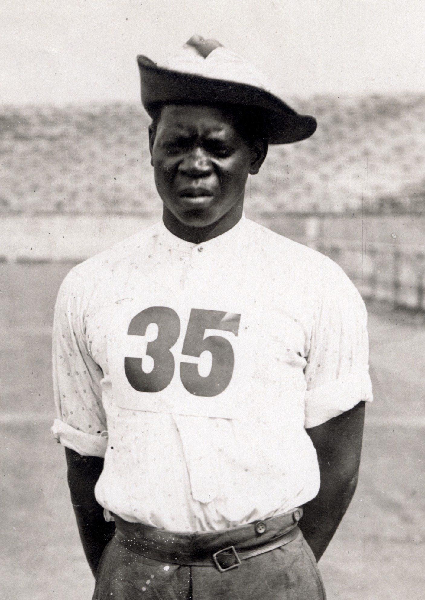 Len Taunyane